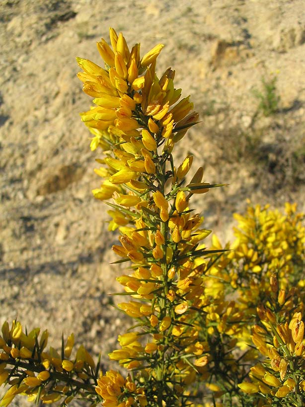 Ajonc de Provence| Ulex parviflorus prise à Ille-sur-Têt